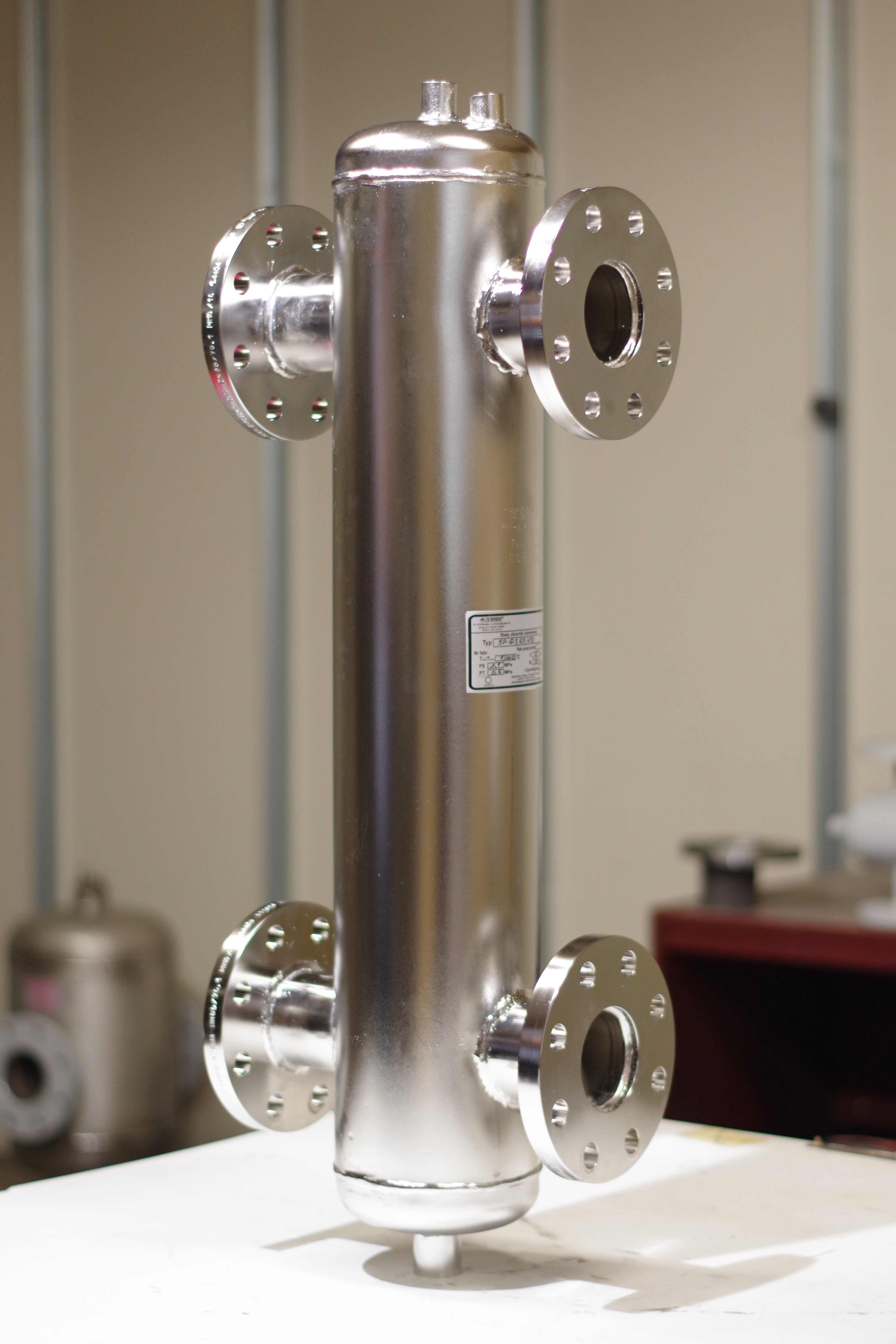 Sprzęgło hydrauliczne wykonane ze stali nierdzewnej